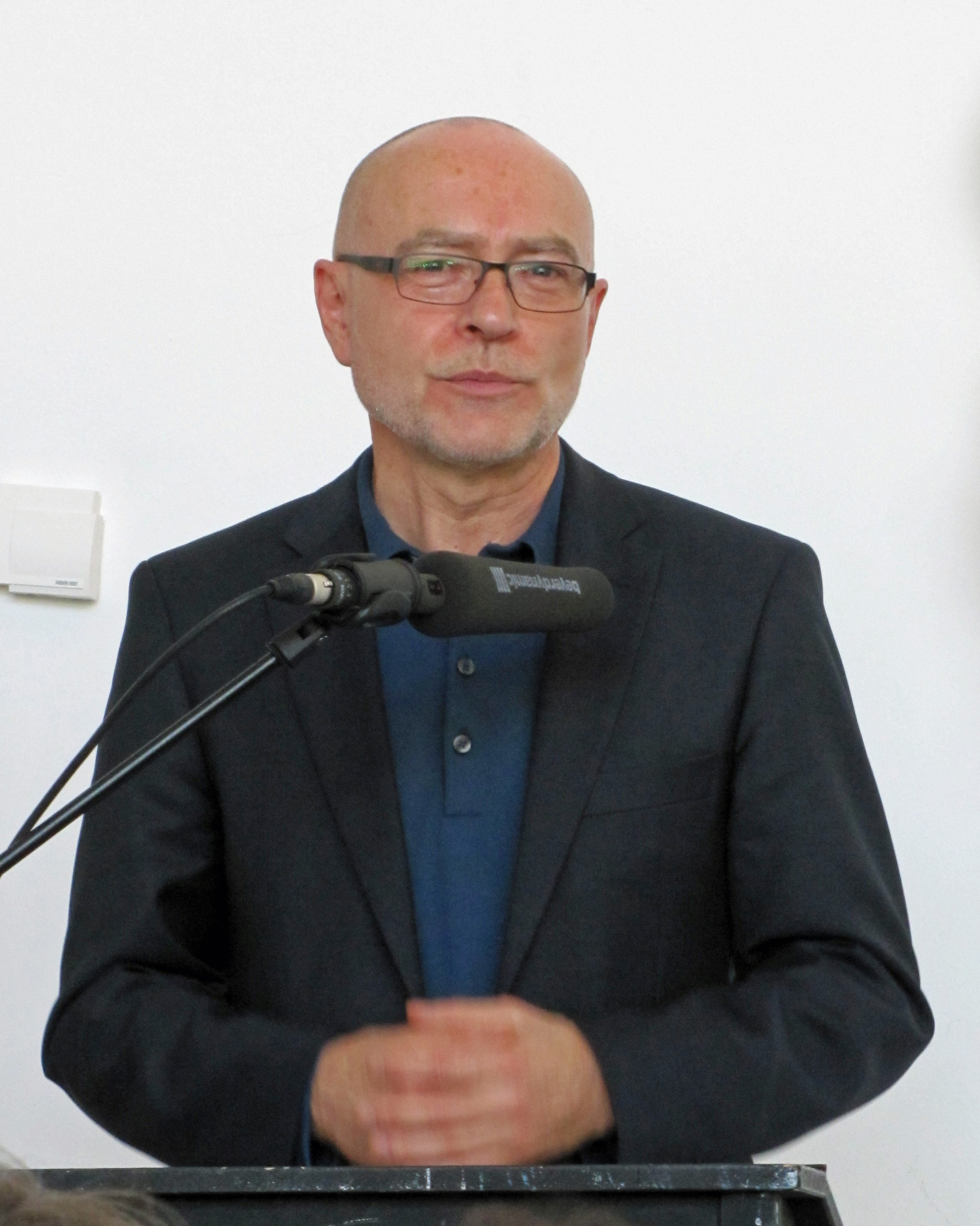 Udo Di Fabio, 2012 bei den Roemerberggespraechen in Ffm.